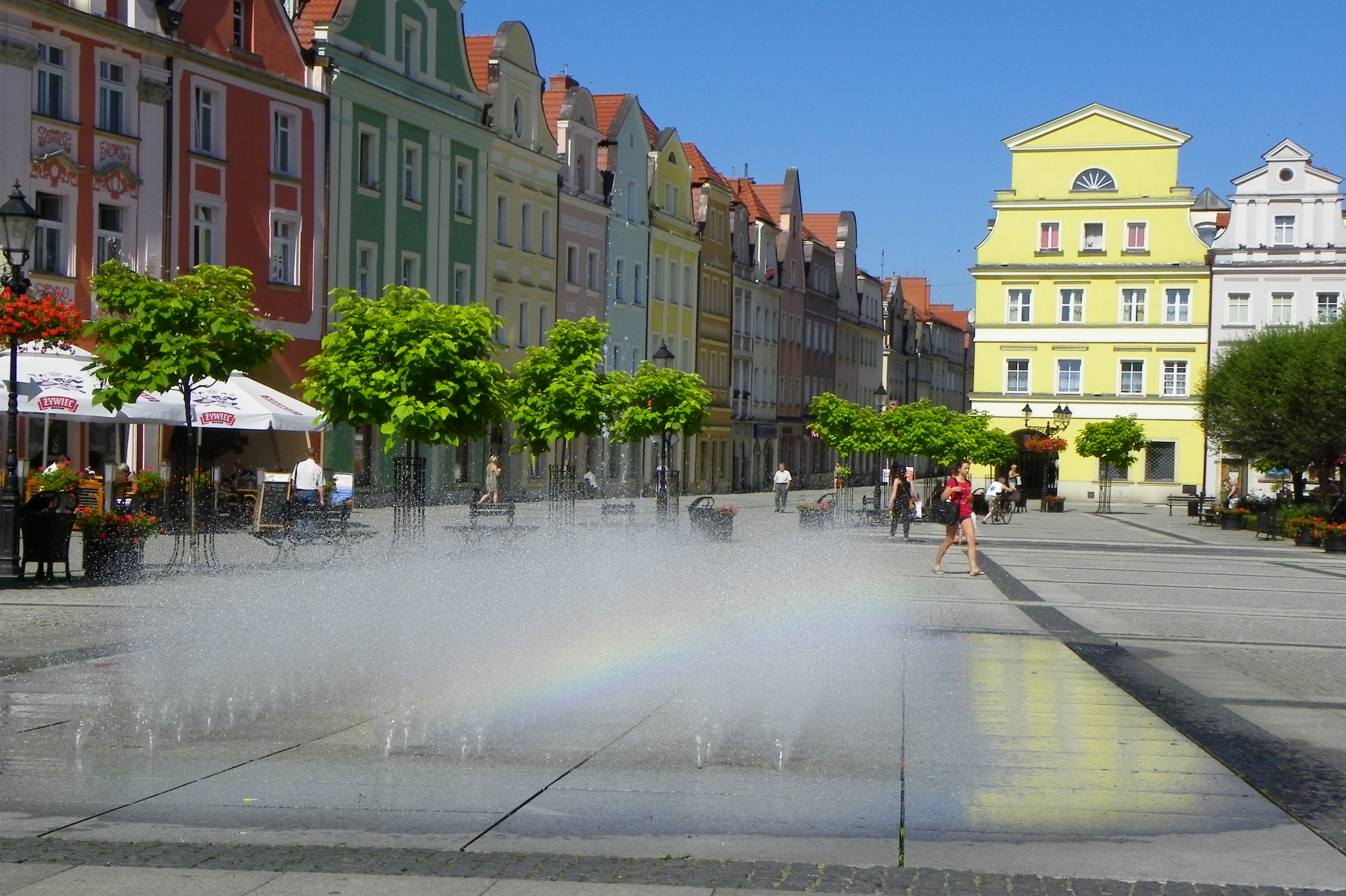 Bolesławiec, rynek z kamienicami